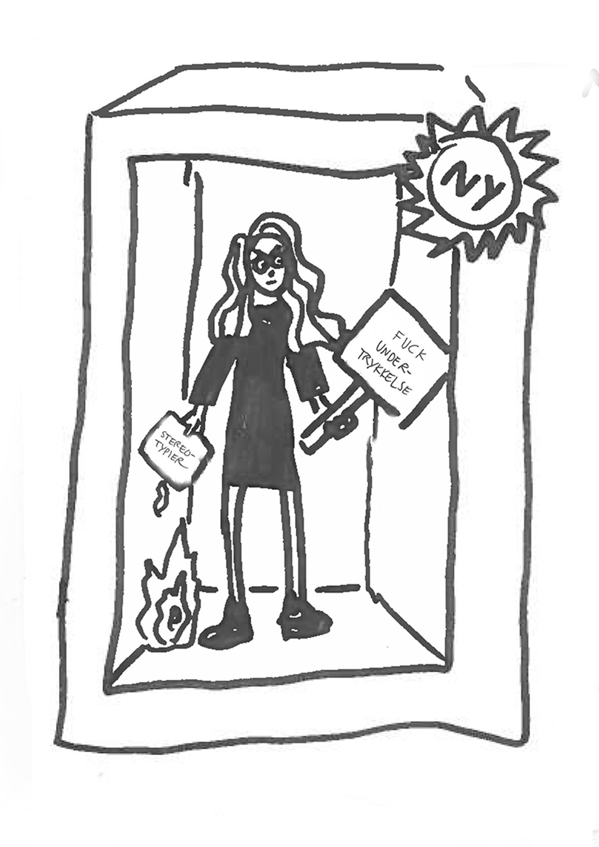 Nyfeminisme er en retning innenfor den nye feminismebølgen som kom på slutten av 1960-tallet og begynnelsen av 1970-tallet.